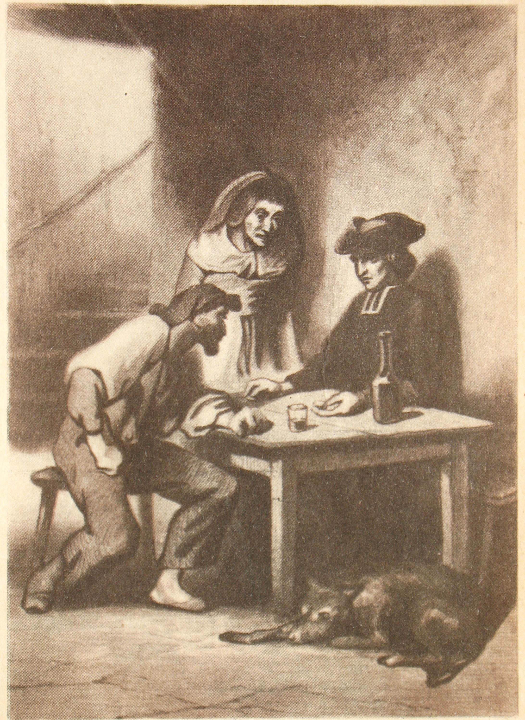 Tony Johannot picture pour Monte Cristo d'Alexandre Dumas. Тони Жоанно. Трактирщик Кадрусс, его жена Карконта, аббат Бузони и алмаз в 1829 году. Рисунок из прижизненного издания романа 1846-52 г., репродуцированный в московском издании.